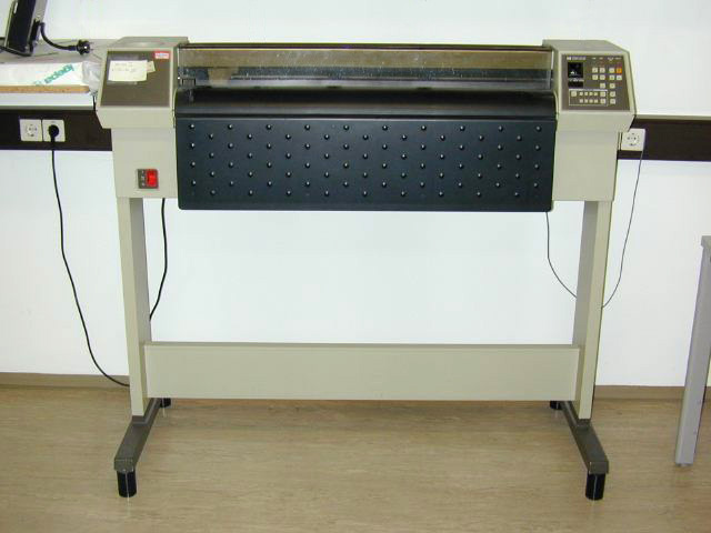 HP A0 Plotter 7585B